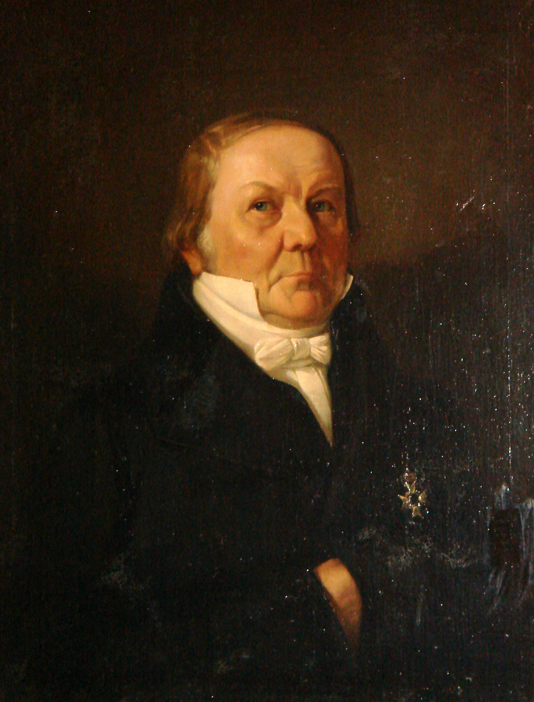 Foto av oljemålning utförd av Carl Staaf föreställande Johan Bredman ( 1770-1859) Professor vid Uppsala universitet.